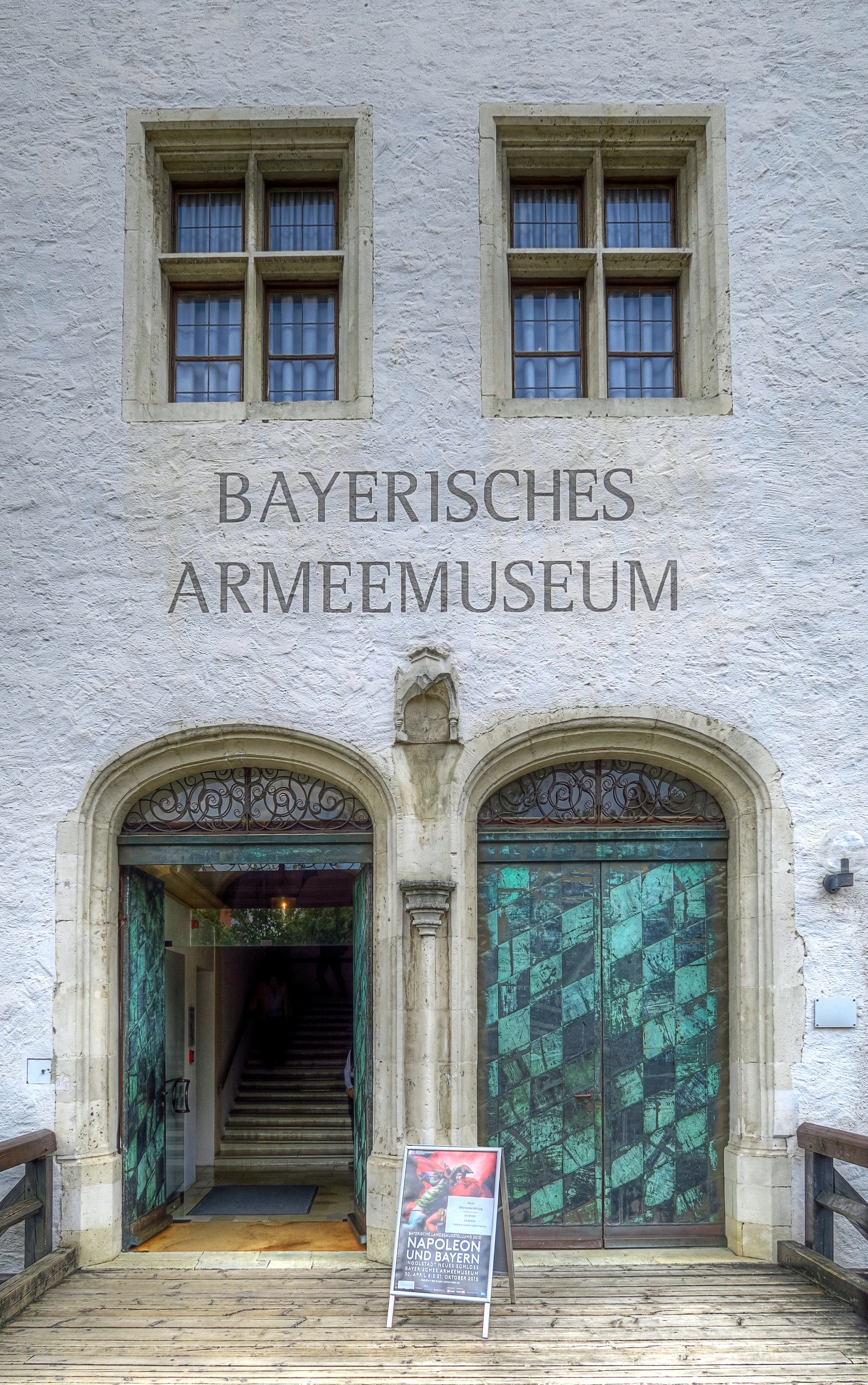 Deutschland, Bayern, Oberbayern, Ingolstadt, Bayerisches Armeemuseum, Eingang zur Bayerischen Landesaussstellung 2015: Napoleon und Bayern